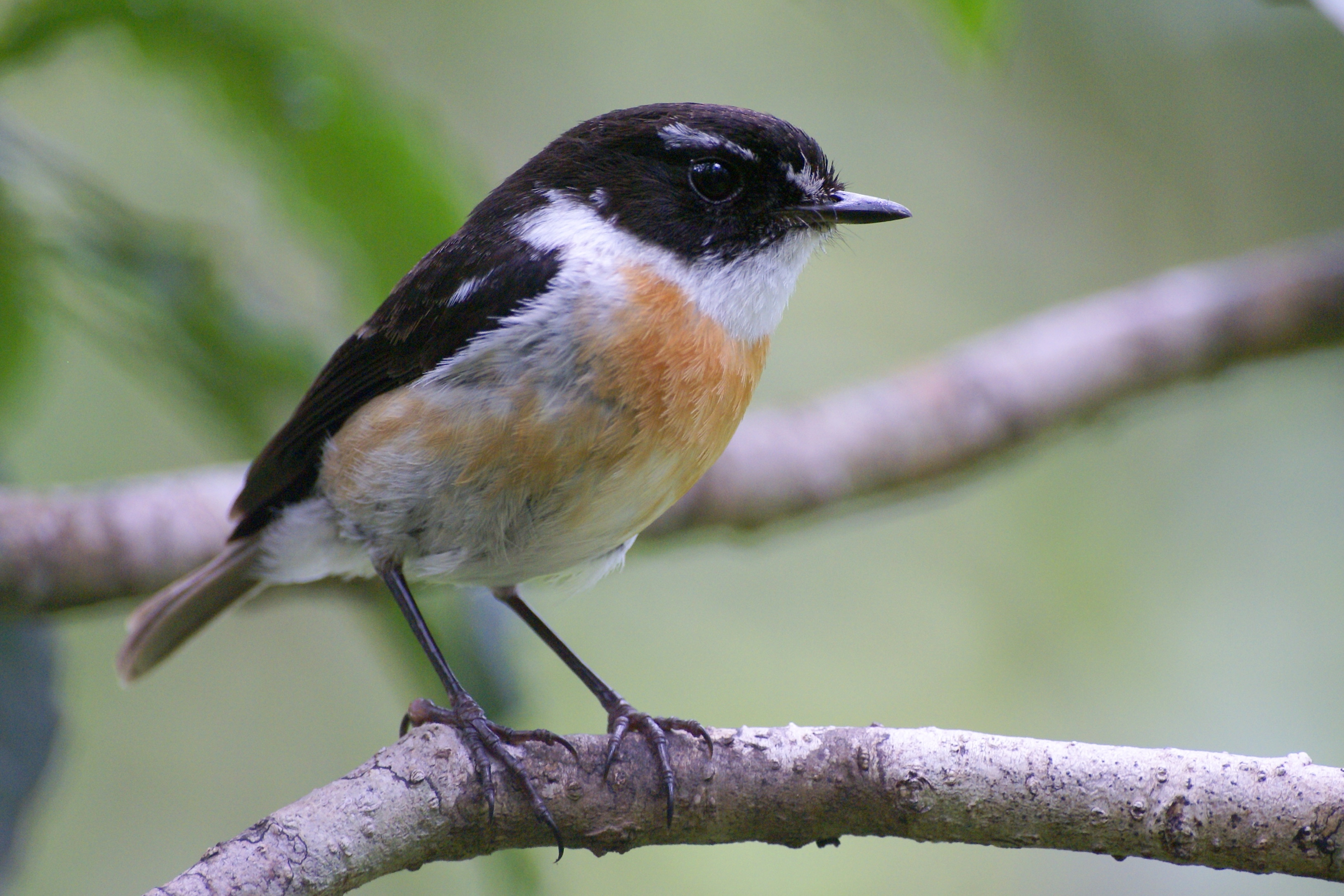 Saxicola tectes en forêt de Mare-Longue (La Réunion)